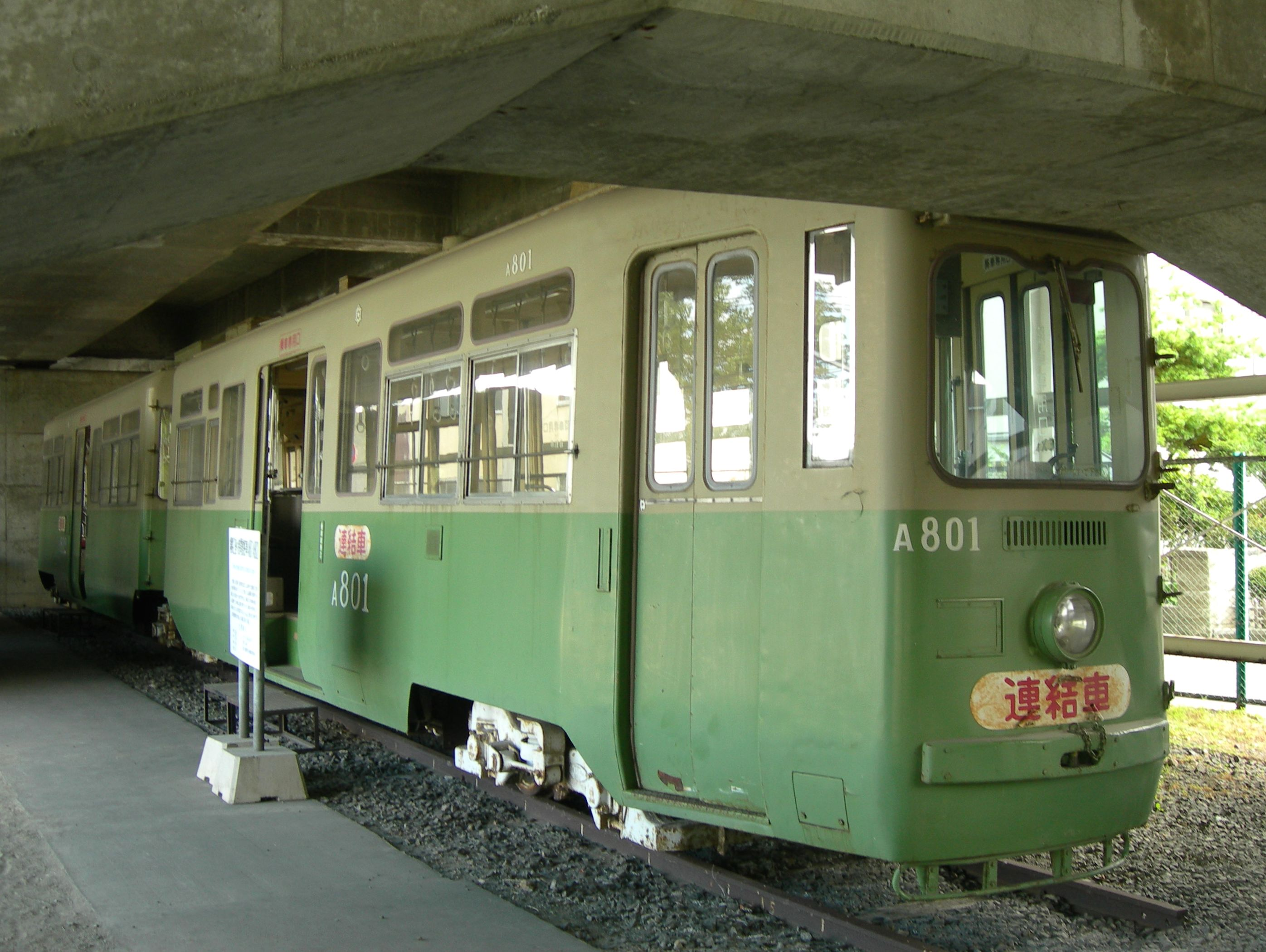 札幌市交通局A800形電車